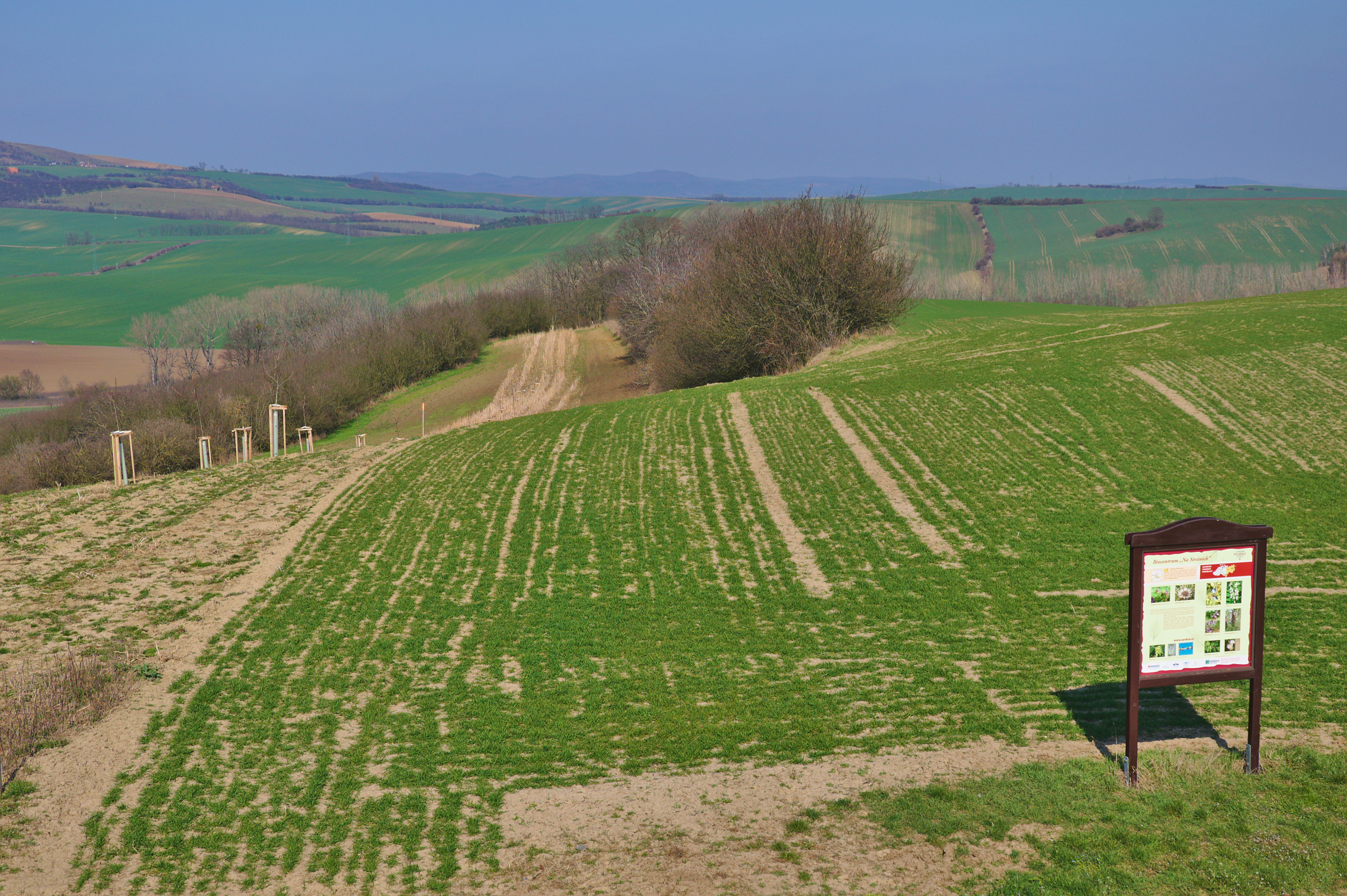 Biocentrum Na Stráních, okres Hodonín